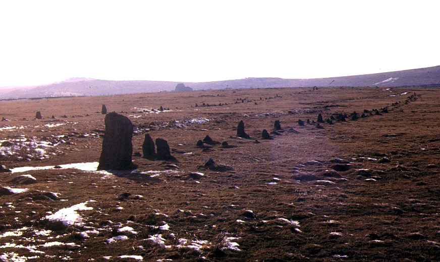 Stone rows, Merrivale, Devon